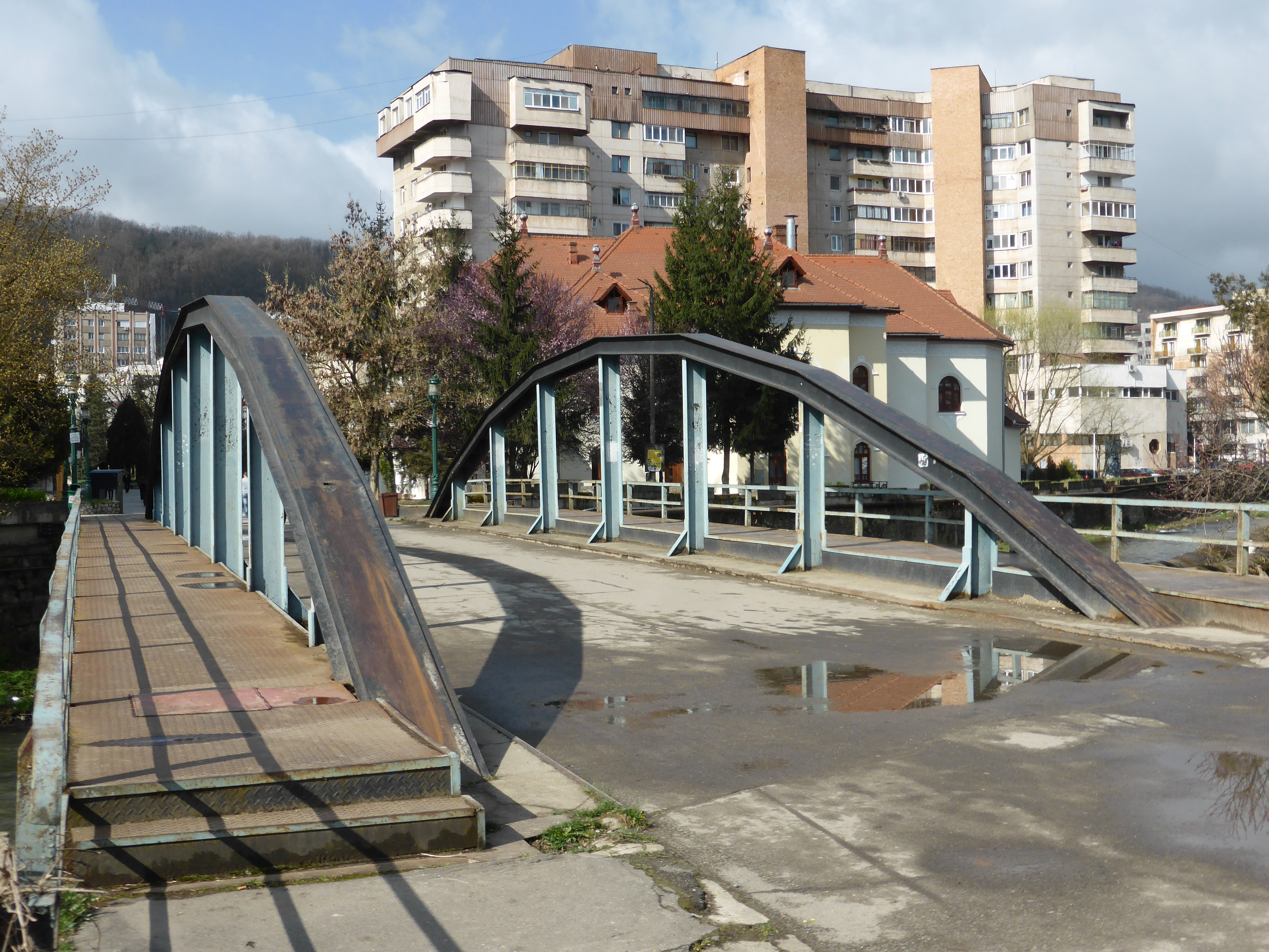 Podul de la Vamă („Zollbrücke“) über die Bersau (Bârzava) in Reschitz (RO), die erste genietete und geschweißte Brücke in Rumänien (1931).